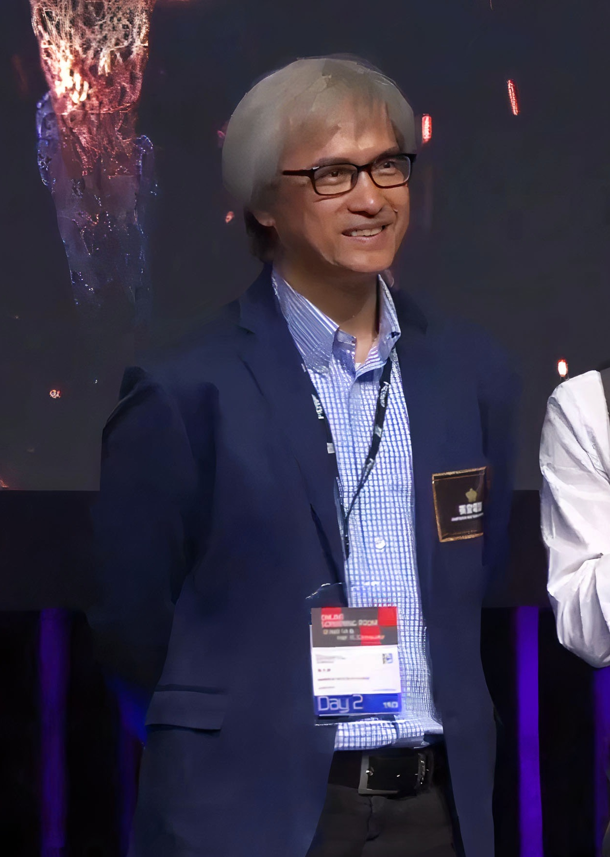 中文（香港）: 《2019英皇電影項目巡禮》